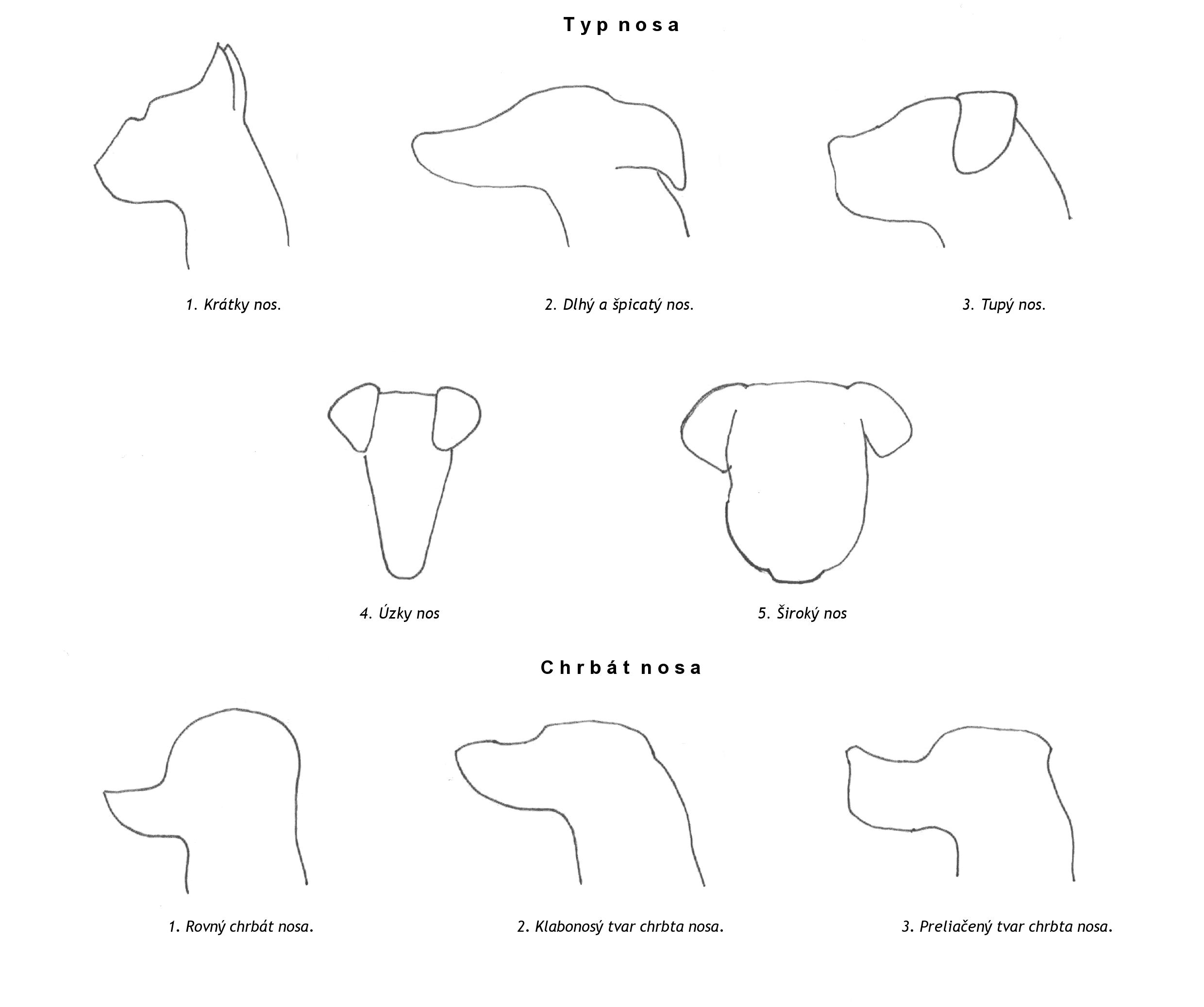 Popis: Nos psa Zdroj: vlastný obrázok (inšpirovaný podľa obrázkov na str. 16 /obr. 5./ a str. 17. /obr 7./ knihy: Najman, J.; Novotný, J.: Atlas plemen psů. Státní zemědělské nakladatelství Praha. 1973. ISBN 07-035-73) Dátum: 2.1.2006 Autor: Prskavka Povolenie: PD Iné verzie tohto súboru: nie